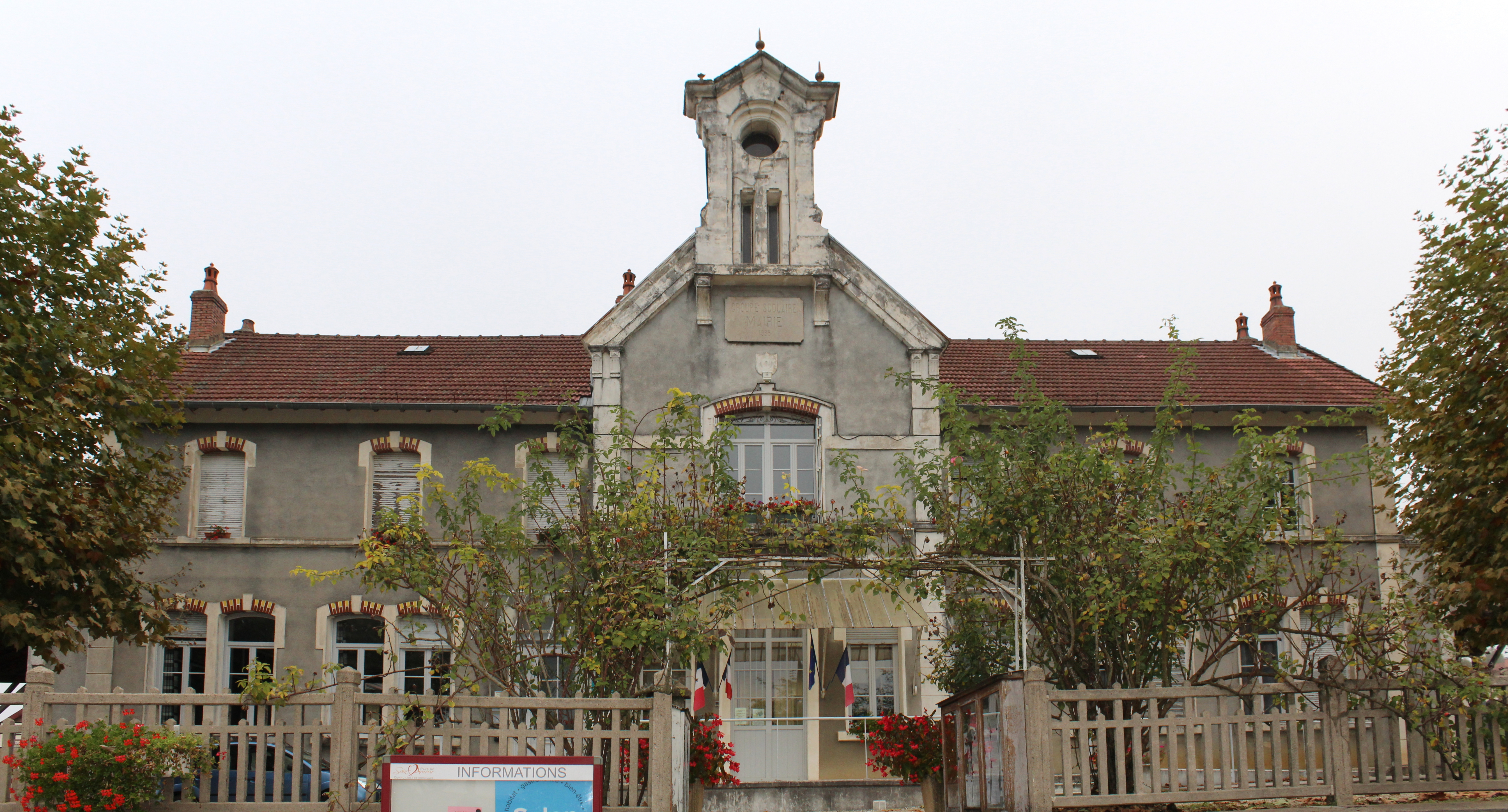 Mairie de Nanc-lès-Saint-Amour, Les Trois-Châteaux.